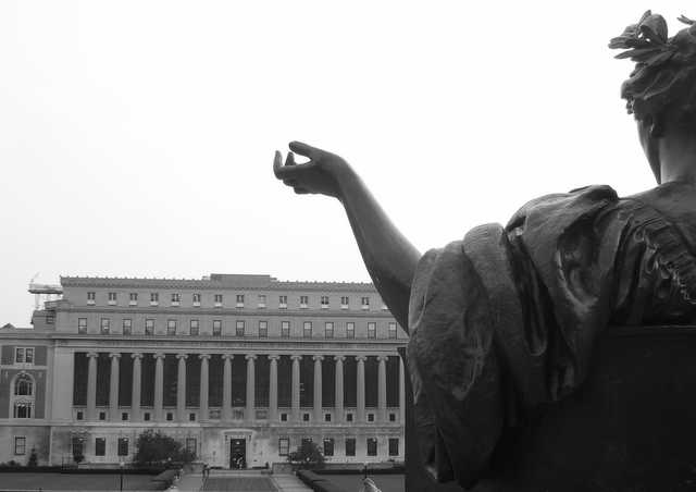 Butler Library, Columbia Universität